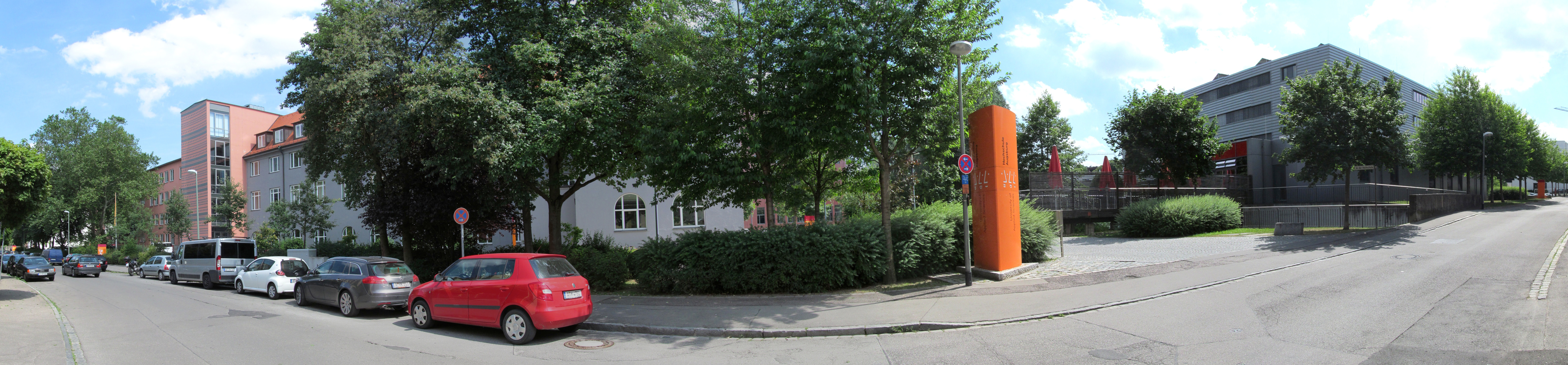 Hochschule Augsburg von Norden.